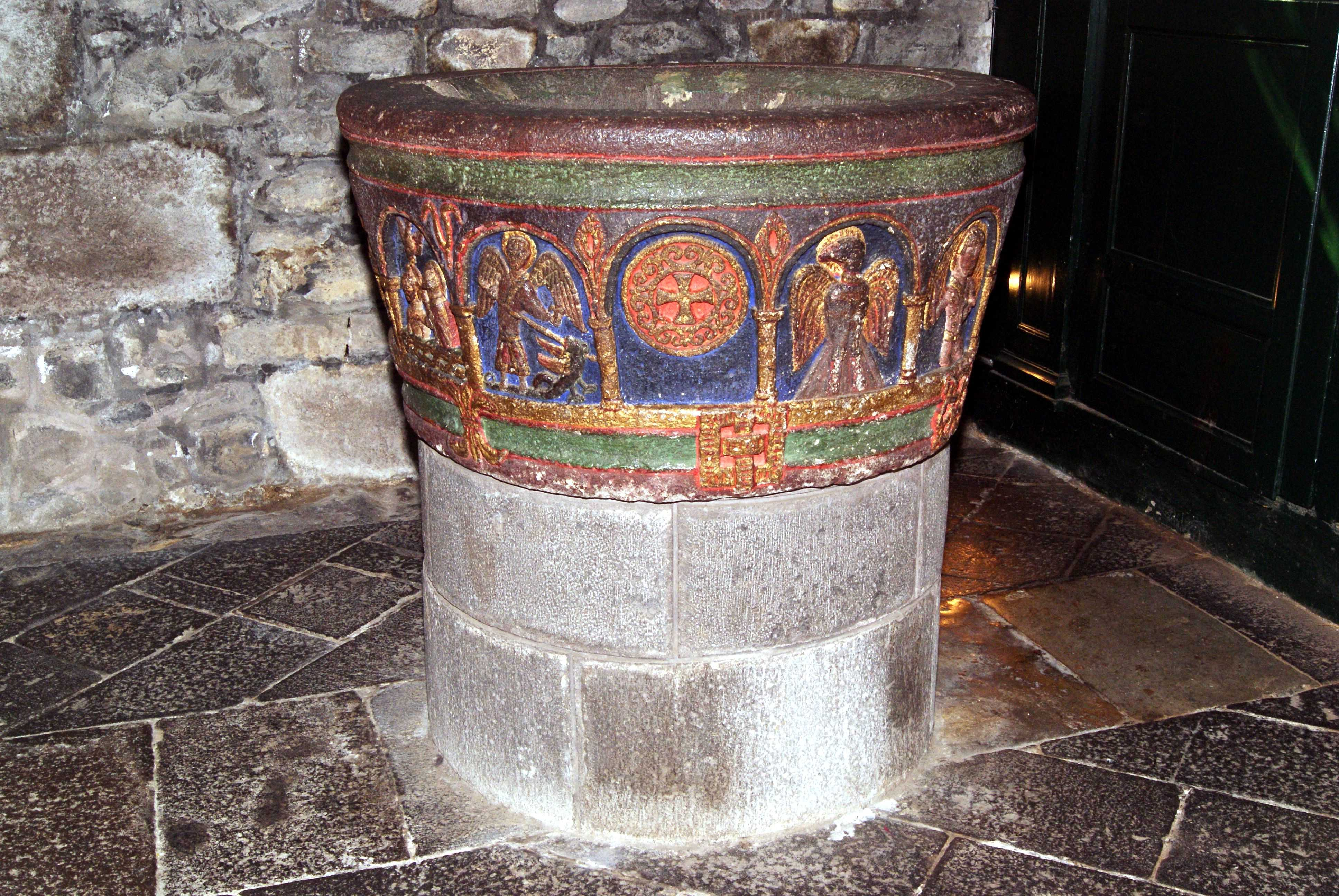 Baptistère